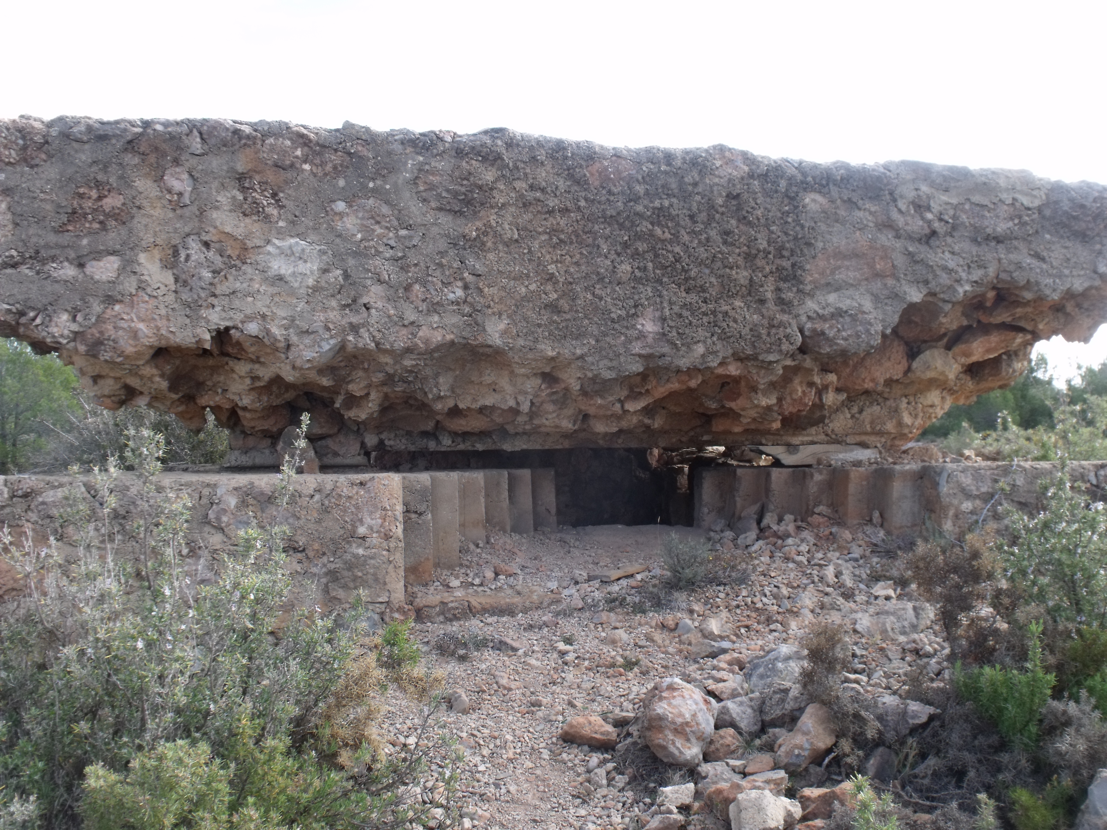 Búnquer oriental de Masadas Blancas. Vista exterior delantera.